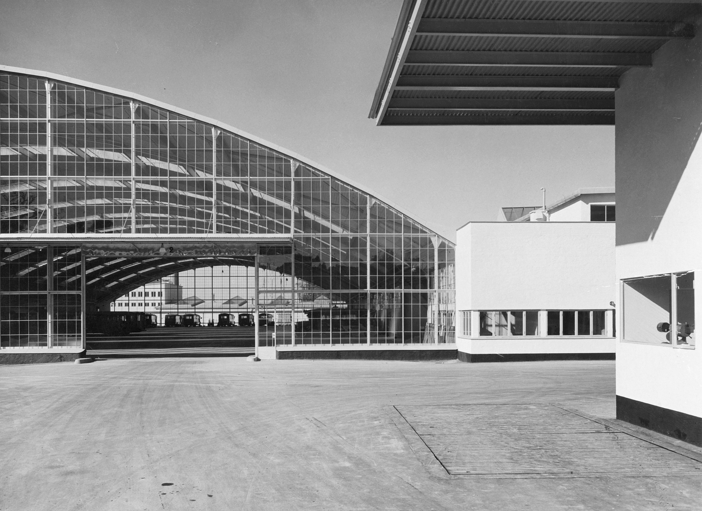 Eskil Sundahl, bussgarage vid Hornsberg i Stockholm